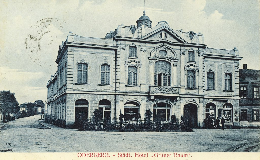 Starý Bohumín, hotel Grüner Baum postavený roku 1907, po druhé světové válce přejmenovaný na Národní dům.